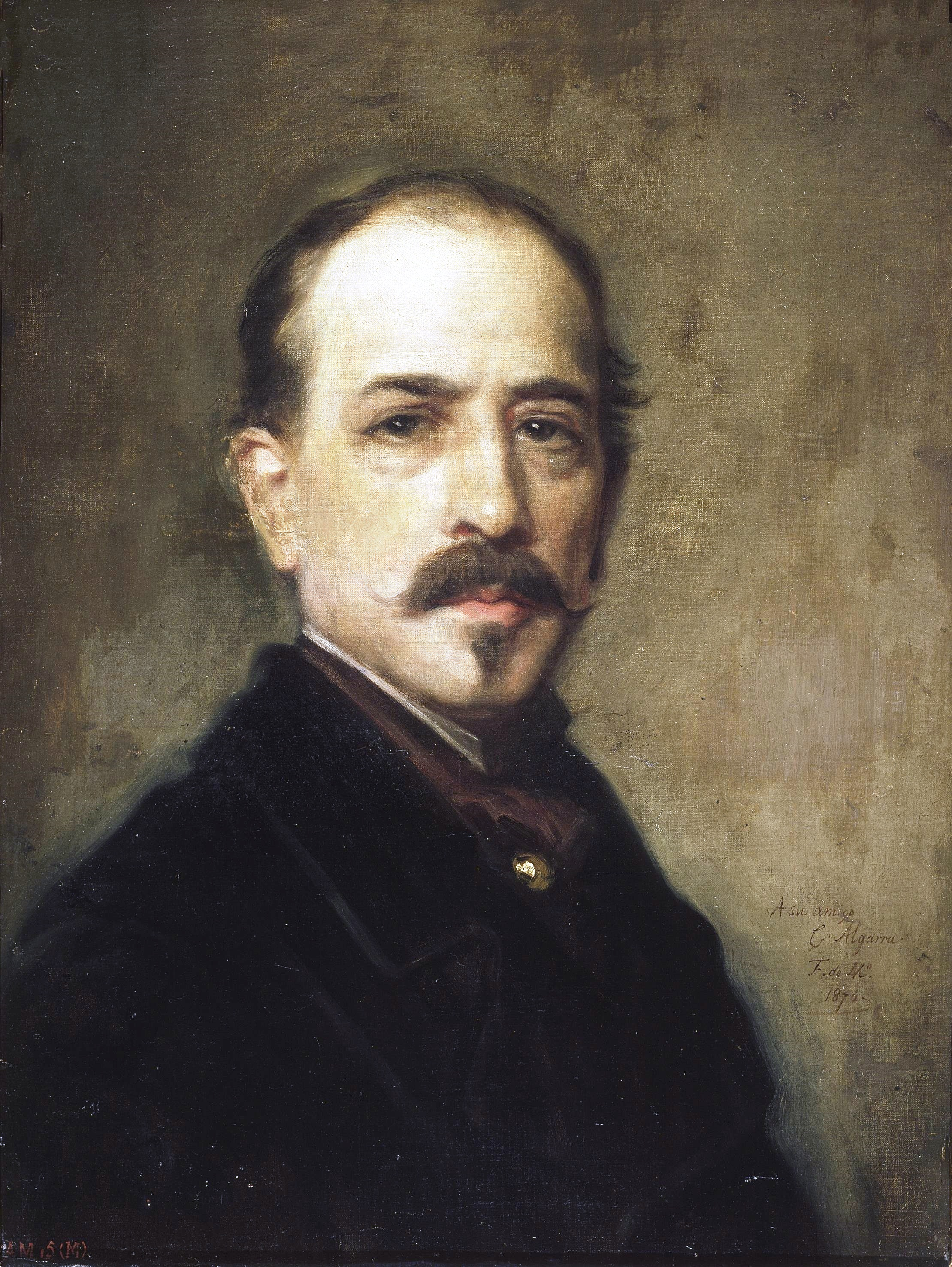 Retrato del pintor español Cosme Algarra y Hurtado (1817-1898).